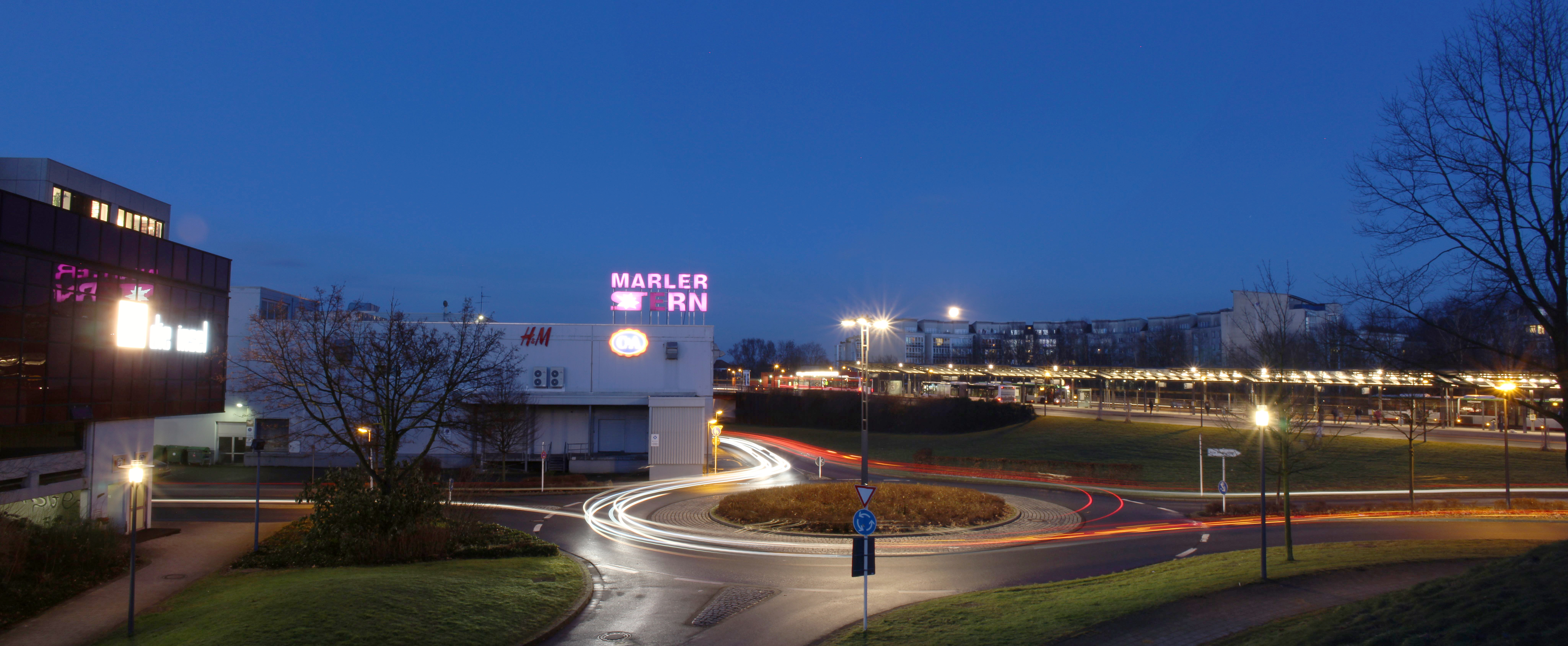 Marl Mitte. V.l.n.r.: VHS "die Insel", EKZ "Marler STERN", Bergstraße, Busbahnhof Marl.